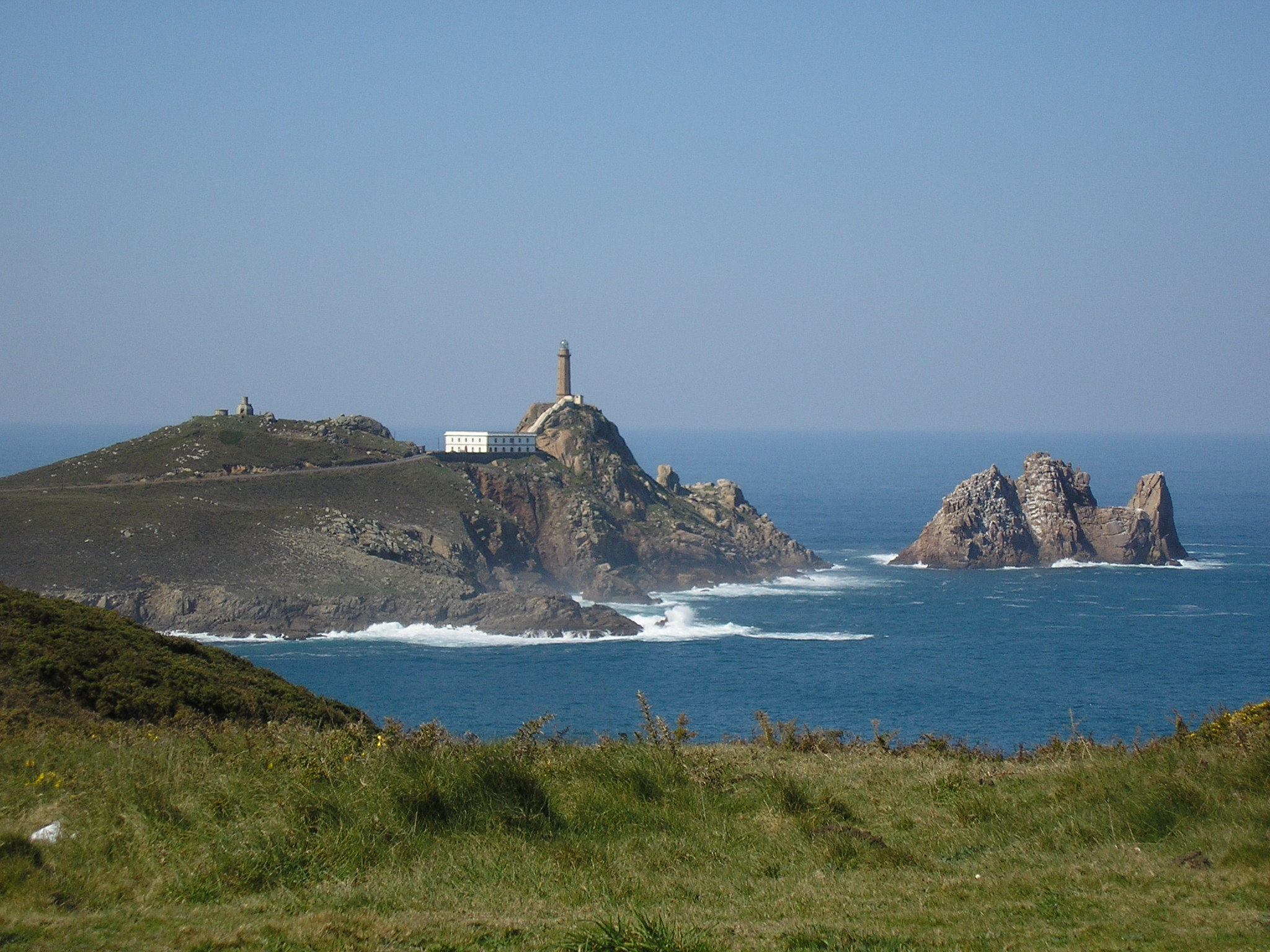 Cabo Vilán mit Leuchtturm (Nordspanien, Costa de la Muerte)